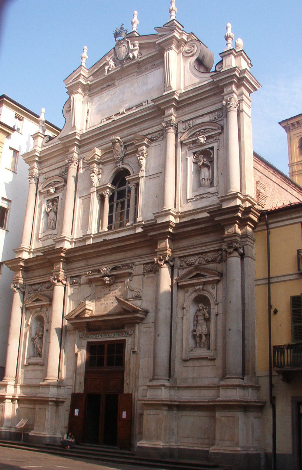 Chiesa Corpus Domini - Torino - Italia